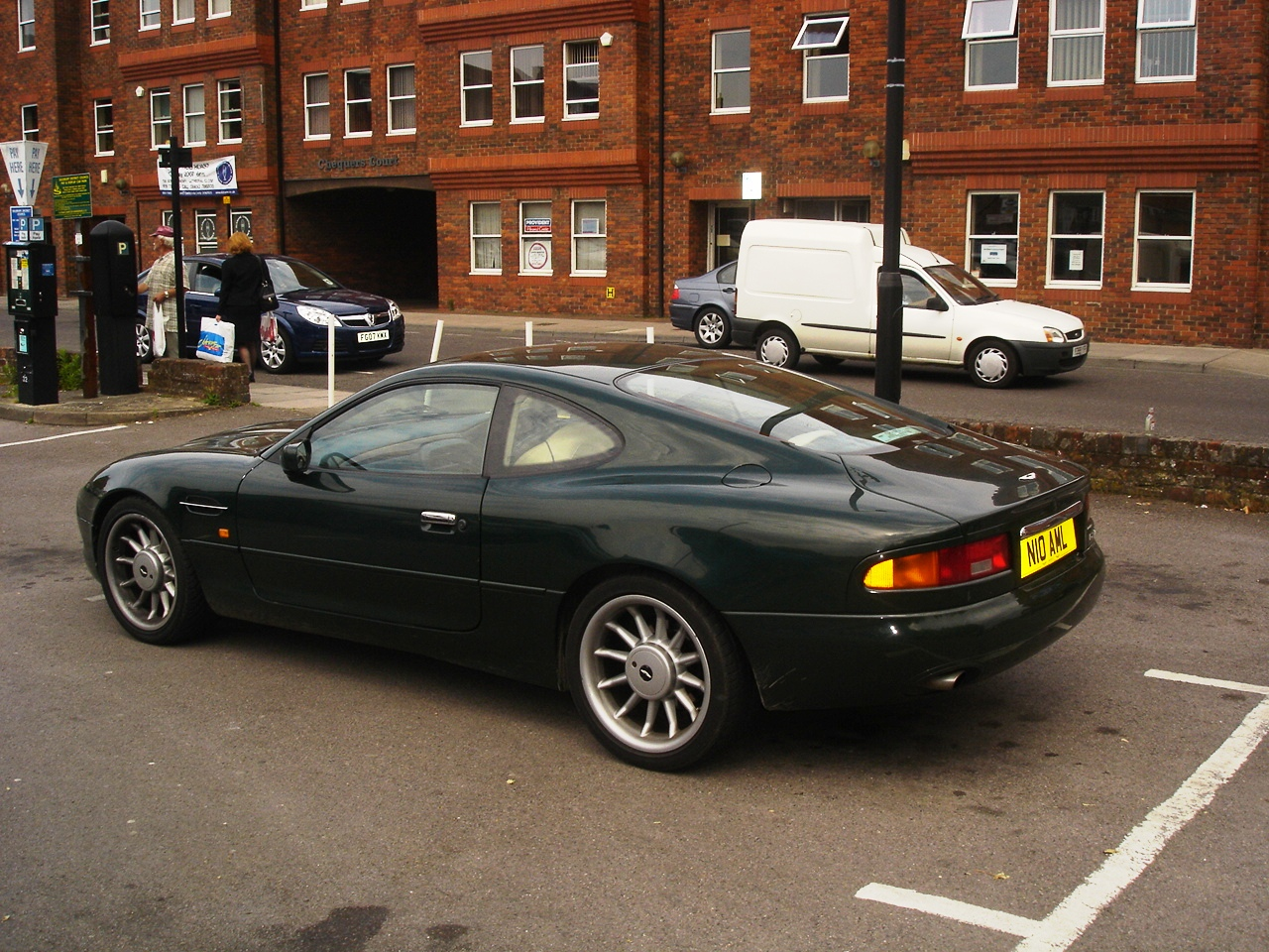 Heck eines Aston Martin DB7 in Salisbury,GB